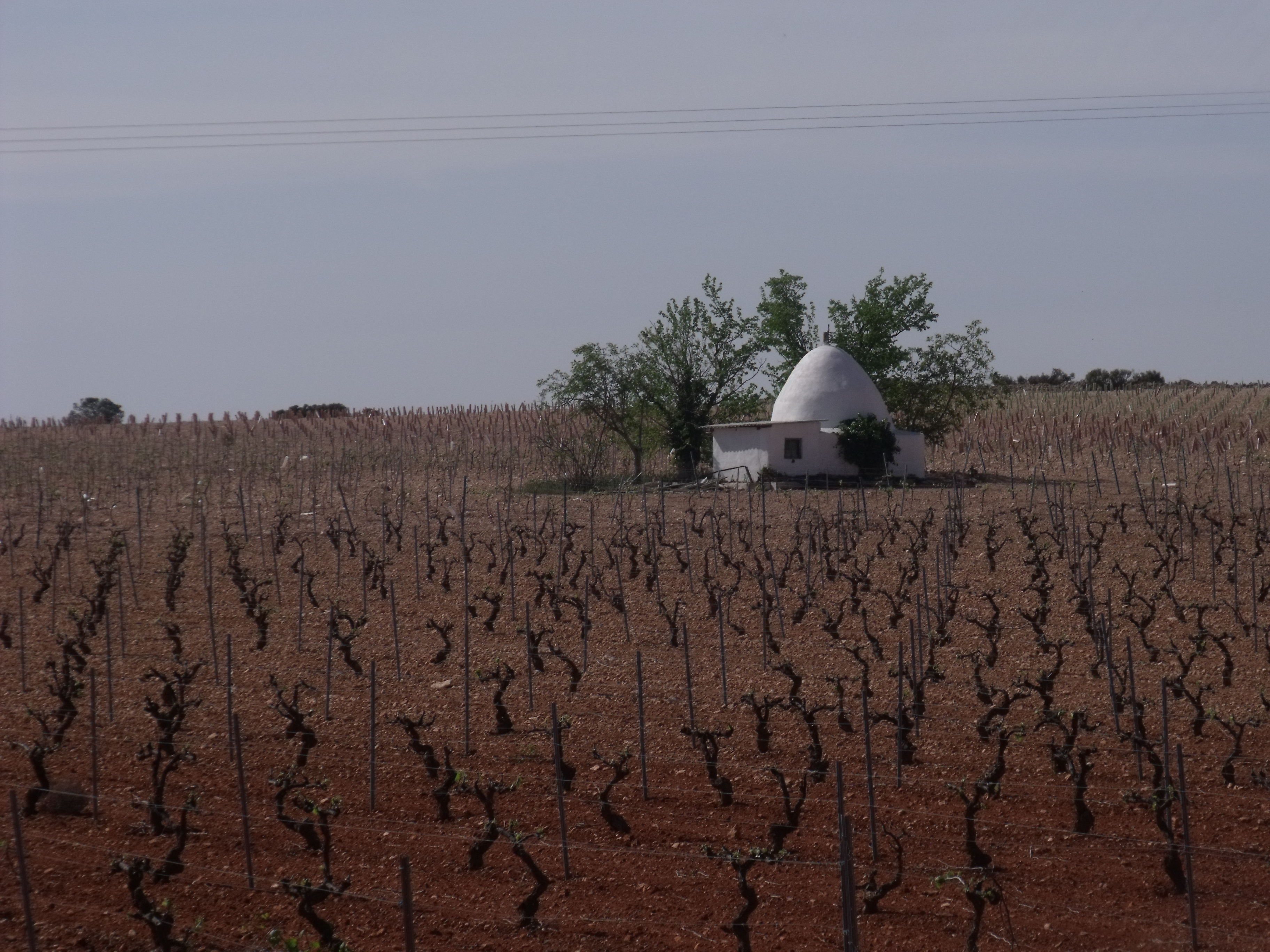 Paisaje de la Manchuela Albaceteña